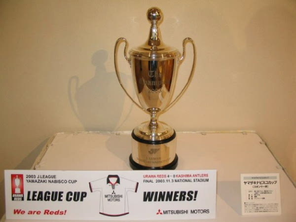 J League Cup